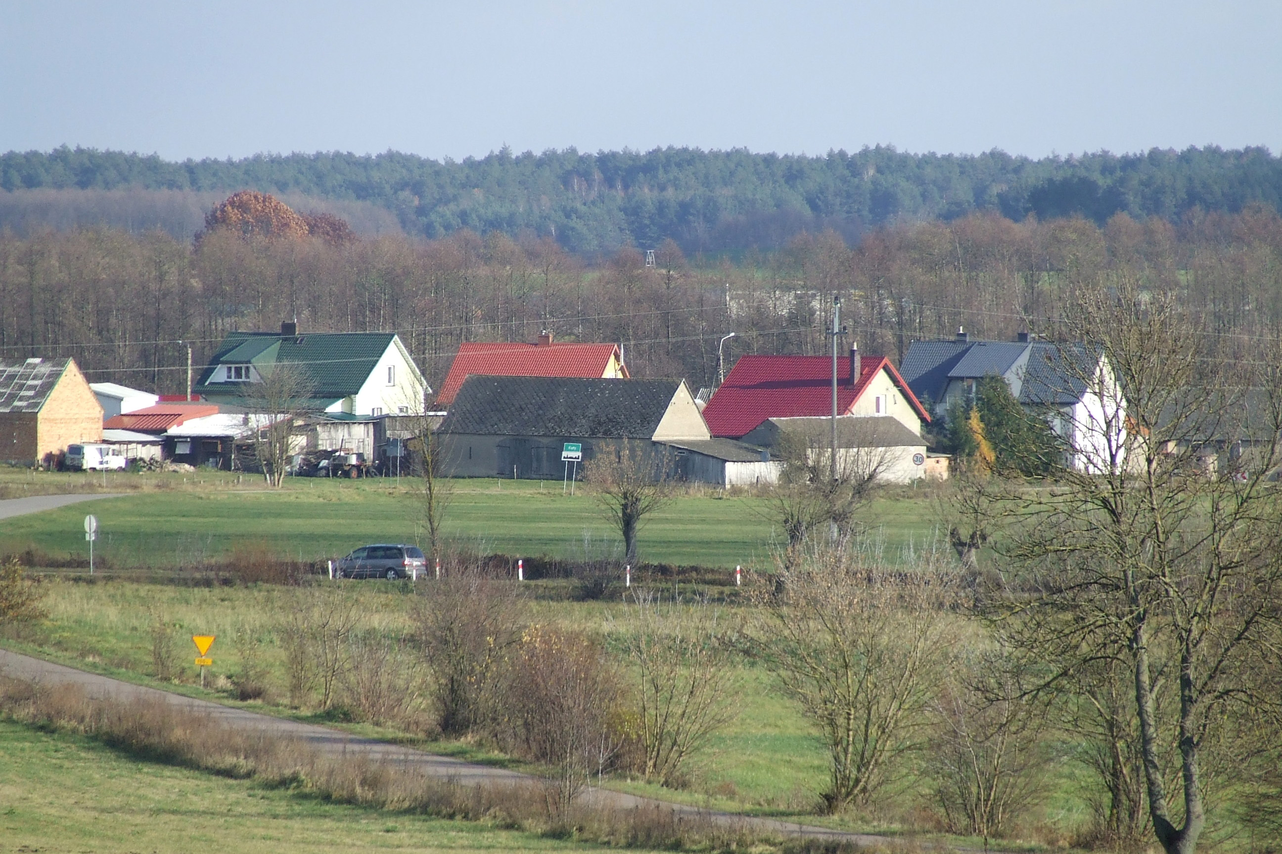 Kąty (powiat kolneński)